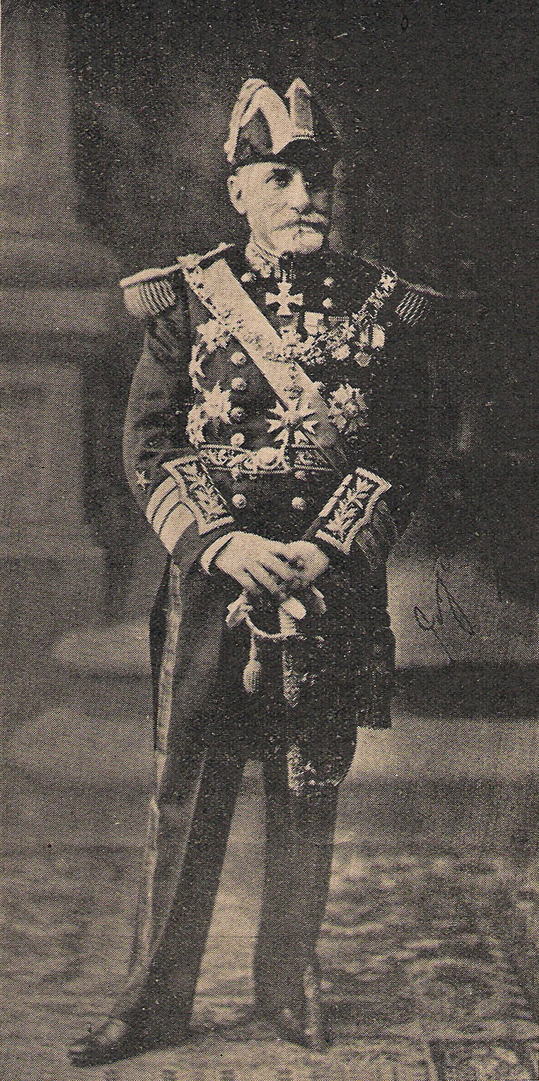 Jorge Montt Álvarez (Casablanca; 26 de abril de 1845 - † Santiago; 9 de octubre de 1922) Marino y político chileno y Presidente de Chile.